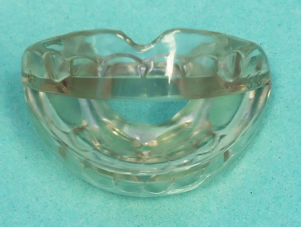 my work